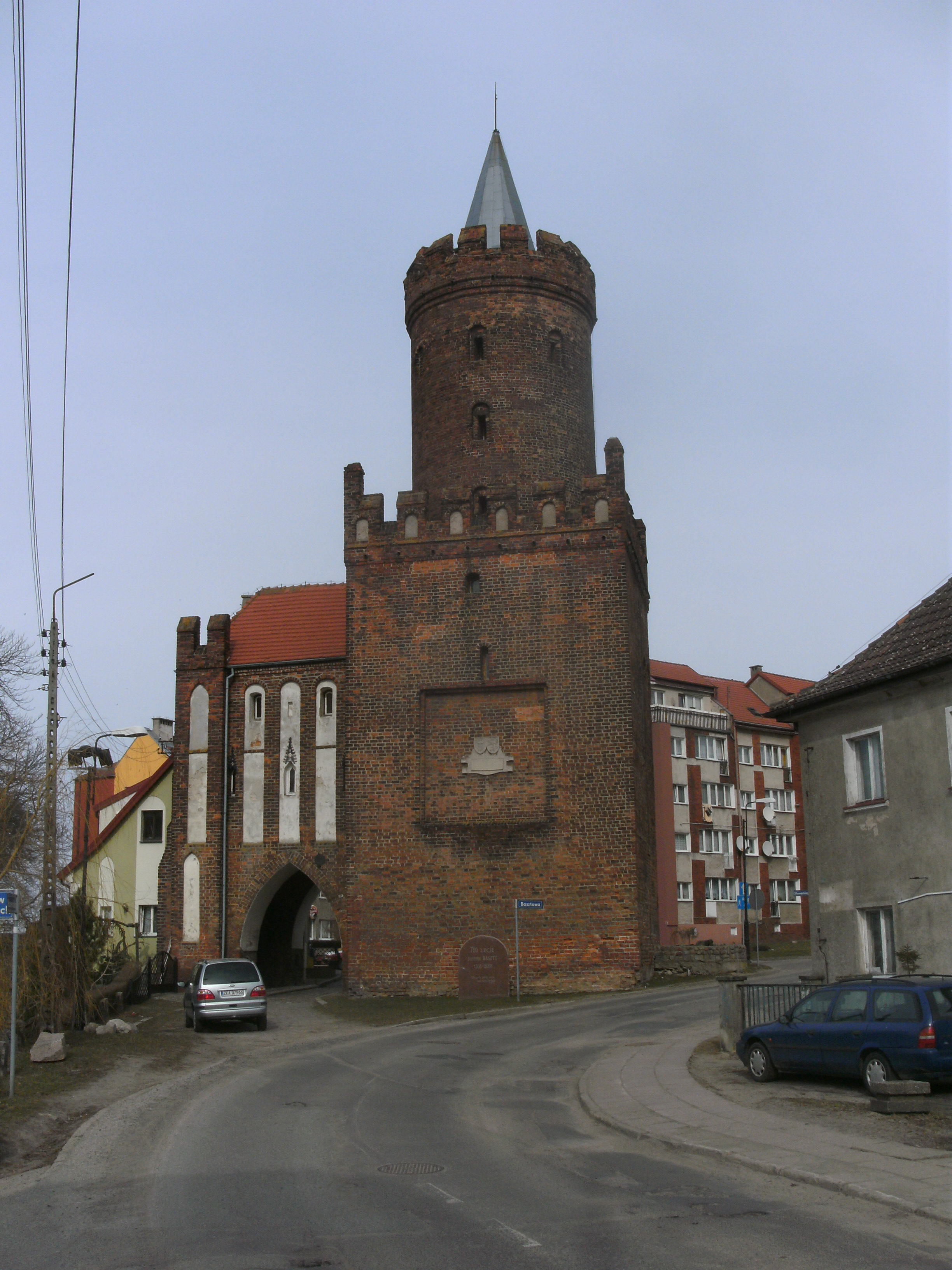 Cammin i. Pom., mittelalterliches Stadttor, wird als "Bautor" oder als "Wolliner Tor" bezeichnet